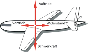 Kräftegleichgewicht am Flugzeug im stationären Reiseflug